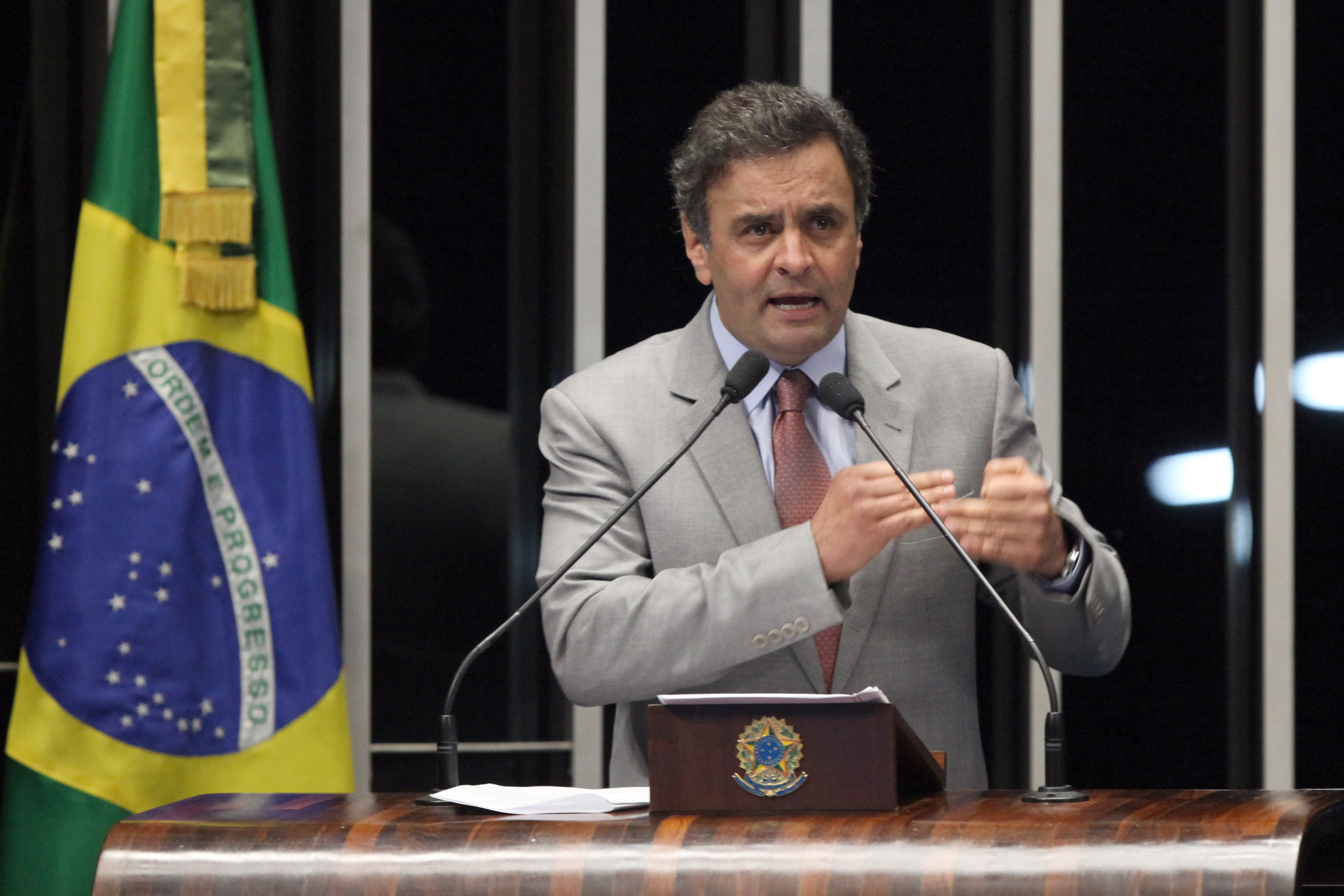 O senador Aécio Neves (PSDB-MG) voltou à tribuna do Senado Federal, nesta terça-feira (25/06), para um pronunciamento cobrando da presidente Dilma Rousseff a adoção de medidas objetivas que atendam às reivindicações da população brasileira.